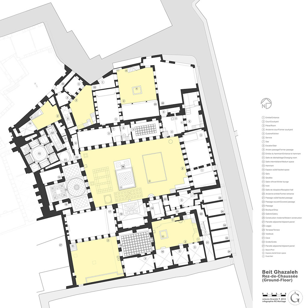 Plan du rez-de-chaussée de la maison Ghazaleh à Alep